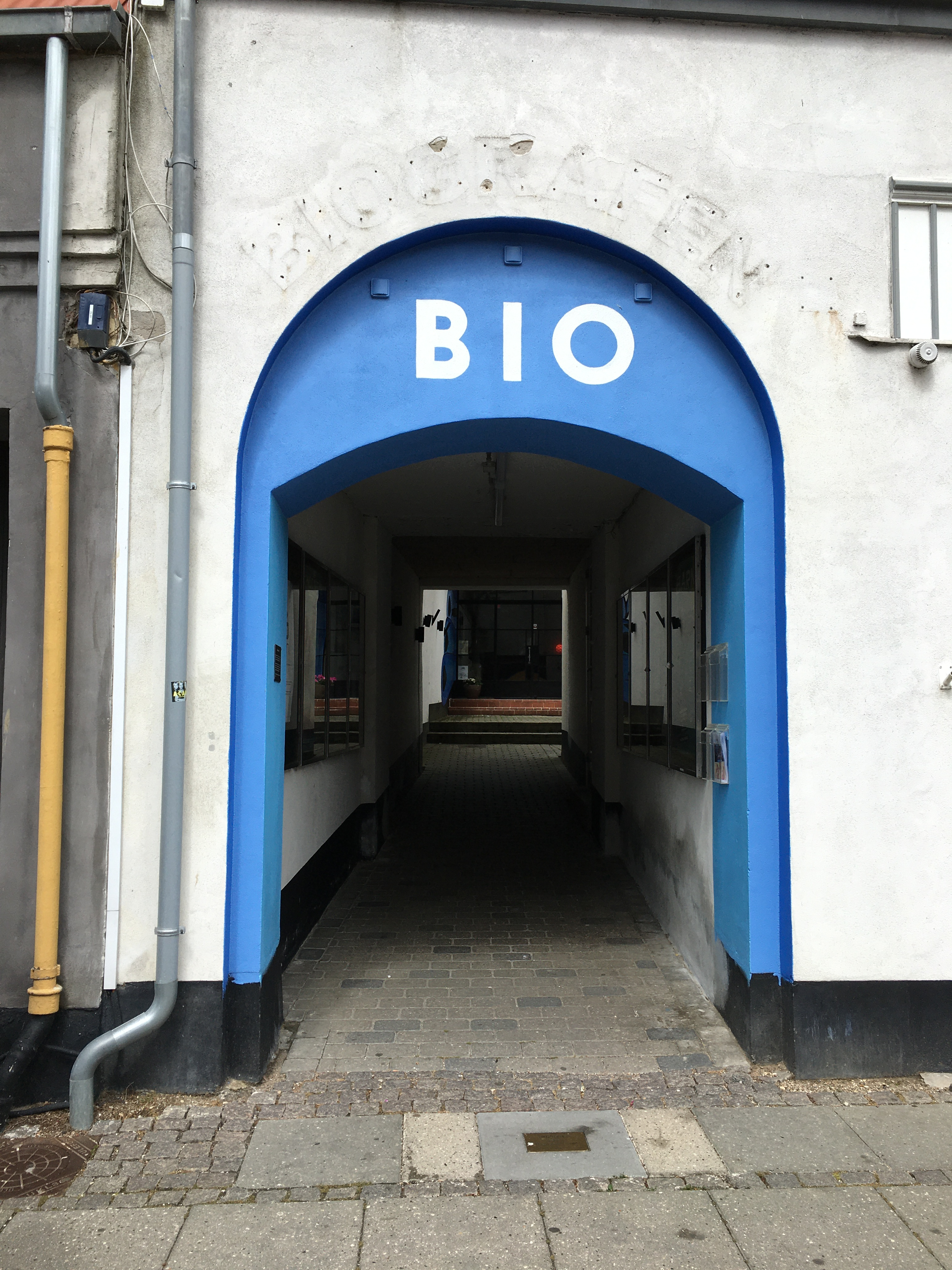 Indgangen ud til Storegade